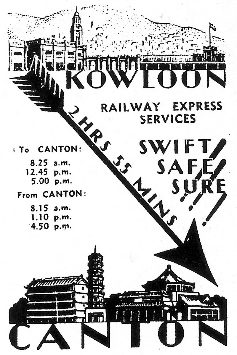 九廣鐵路（九龍至廣州）海報。